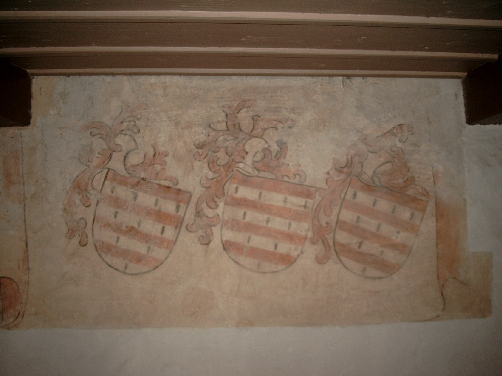 Dorfkirche Görsdorf b. Storkow, Stadt Storkow (Mark), Lkr. Oder-Spree, Brandenburg, Deutschland, Wappen der Familie v. Queiss (Zustand Juli 2002)